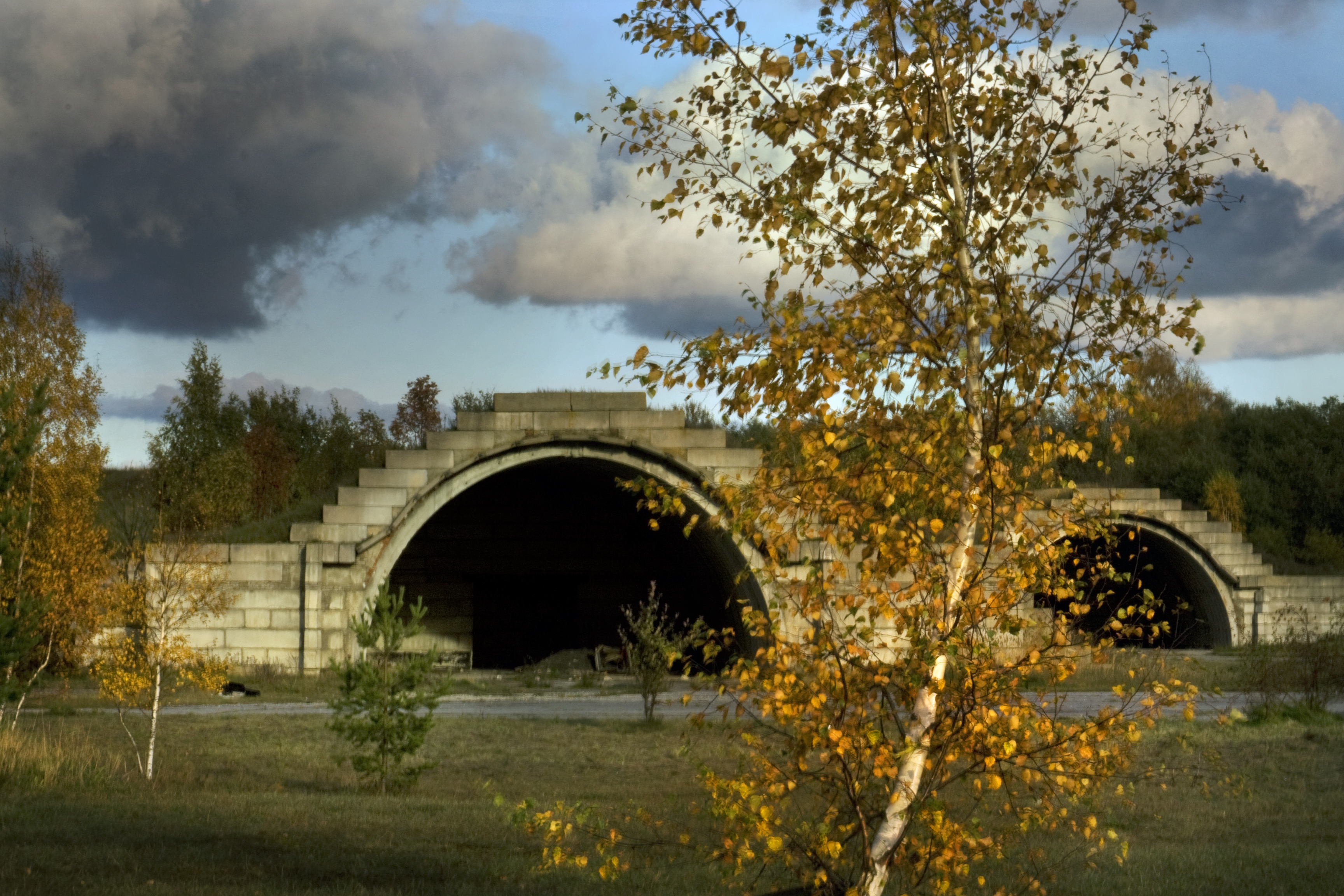 Kiltsi endine lennuväli